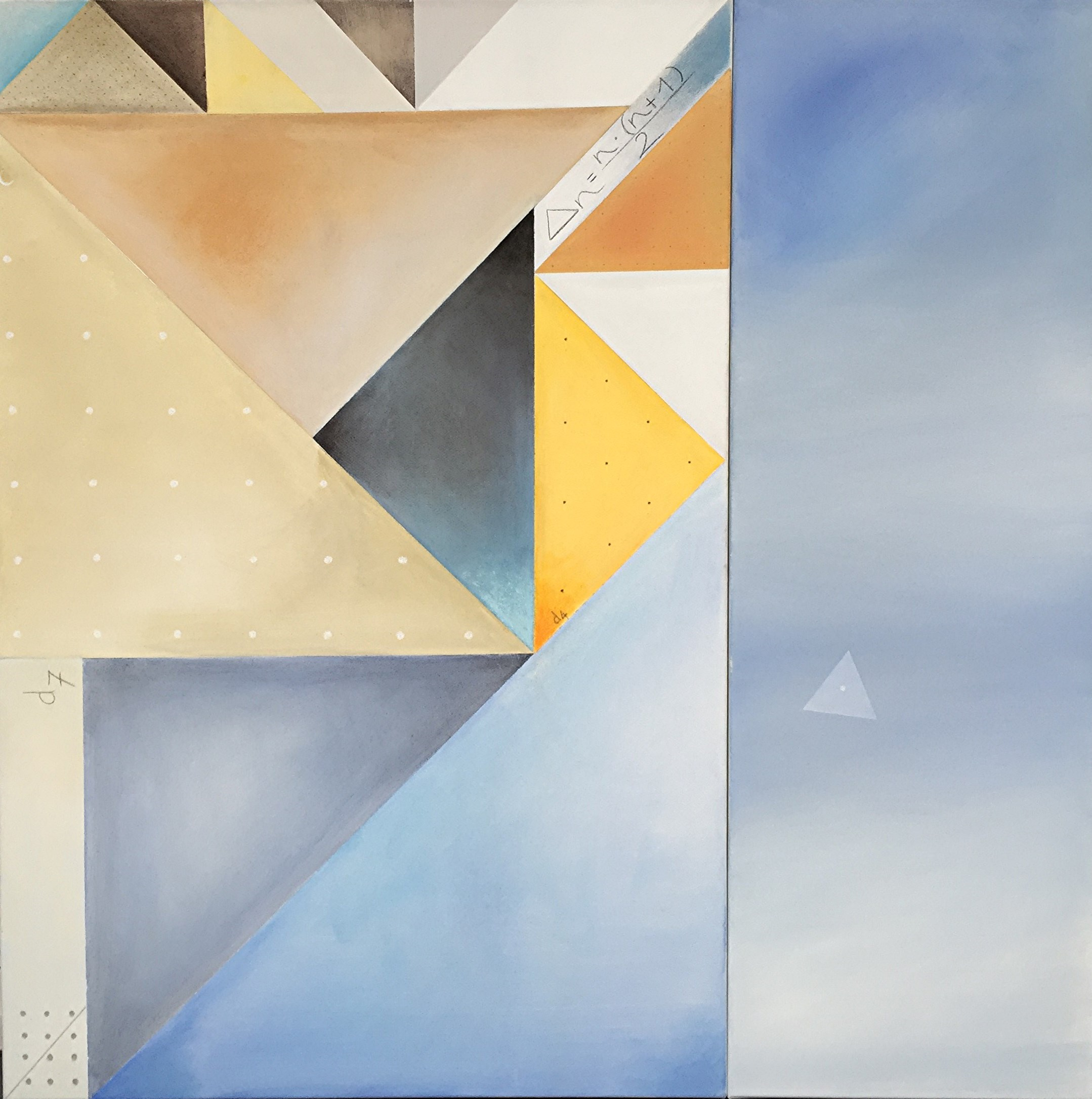 Hier wird die Berechnung von Dreieckszahlen mit Hilfe der Gaußschen Summenformel erklärt.